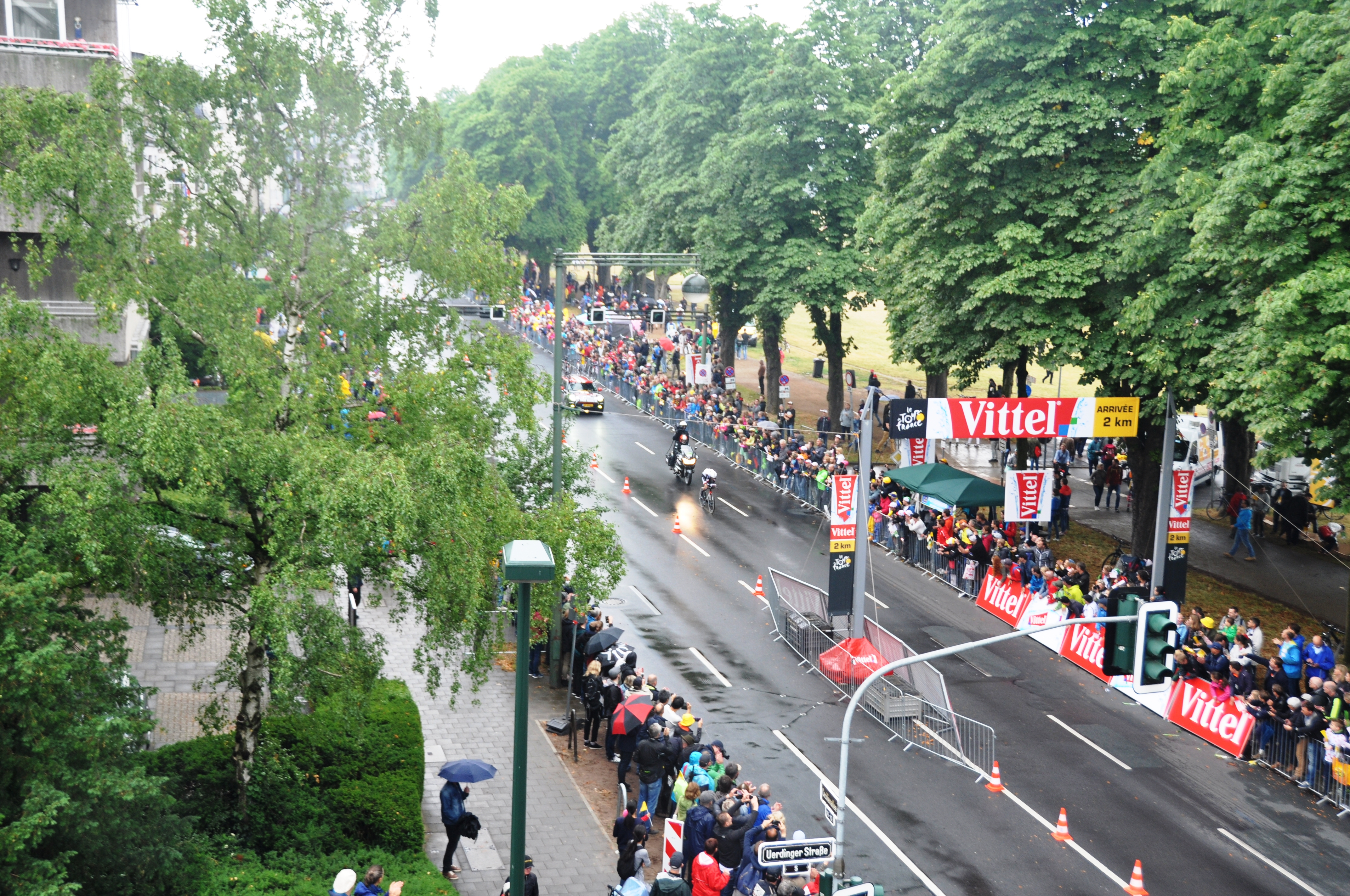 Blick auf die Strecke mit leicht regennasser Fahrbahn im nicht immer strahlend schönen Sommer in Deutschland oder Mitteleuropa; einige Fahrer bei der Tour de France in Düsseldorf am 1. Juli 2017 hatten die Wetterverhältnisse vielleicht nicht ausreichend bei ihrer Fahrt beachtet ...